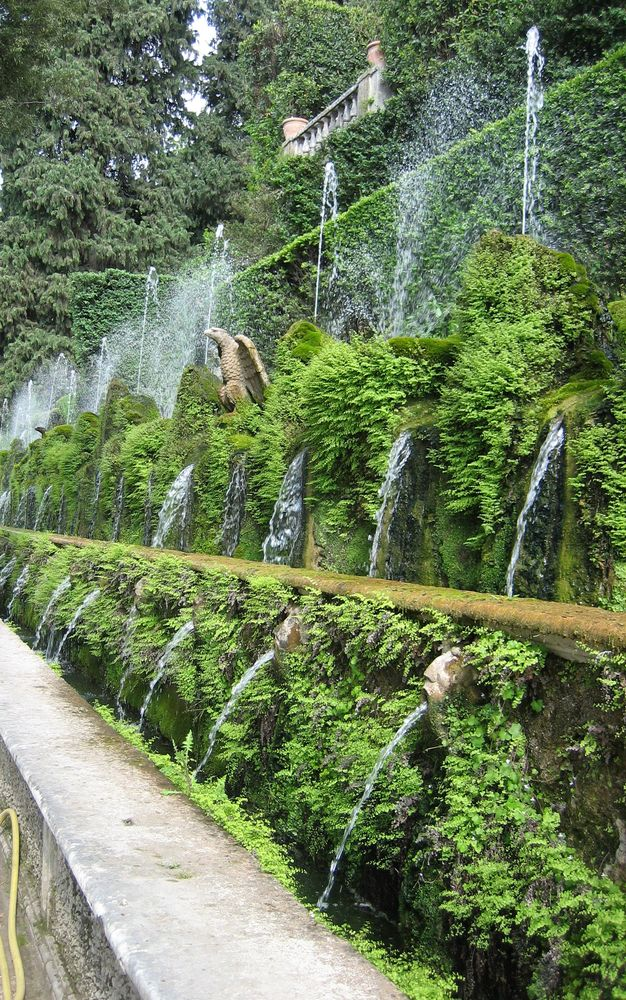 Villa d'Este - Tivoli (Italie) - fontaines